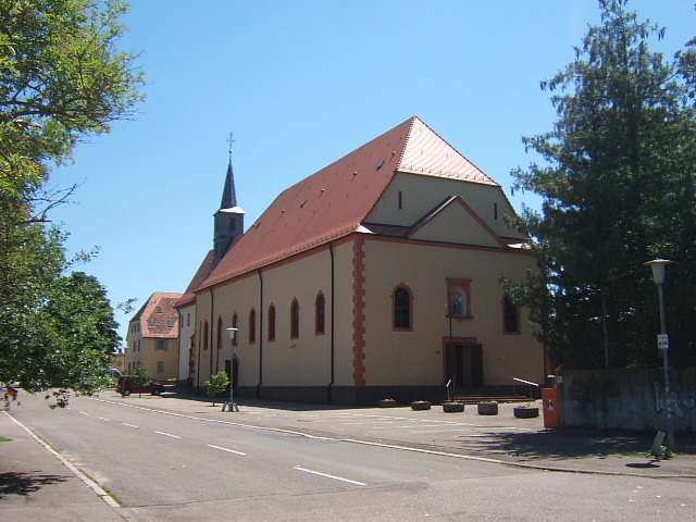 Die Marienwallfahrtskirche zu Waghäusel. Im Hintergrund schließt sich das Kloster an. Rechts der Kirche befindet sich der alte Friedhof.